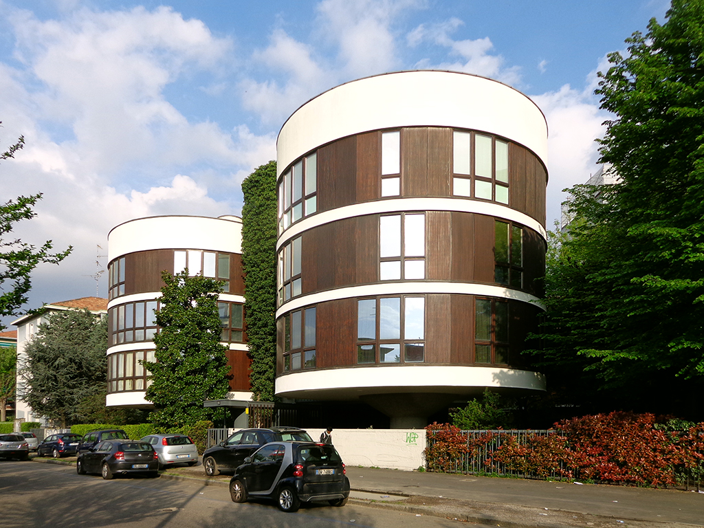 Milano, la cosiddetta “casa a tre cilindri” in via Gavirate 27.